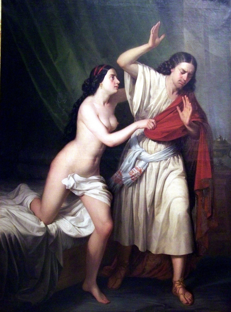 La obra representa a José, hijo del patriarca hebreo Jacob, escapando y rechazando a la mujer de Putifar, que pretendía acostarse con él.